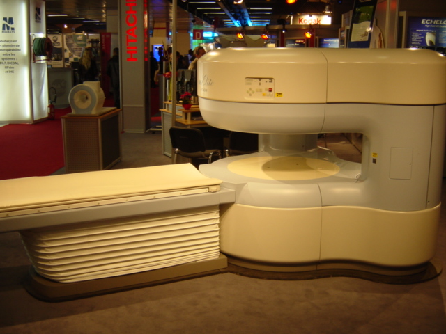 Appareil IRM Hitachi en géométrie ouverte